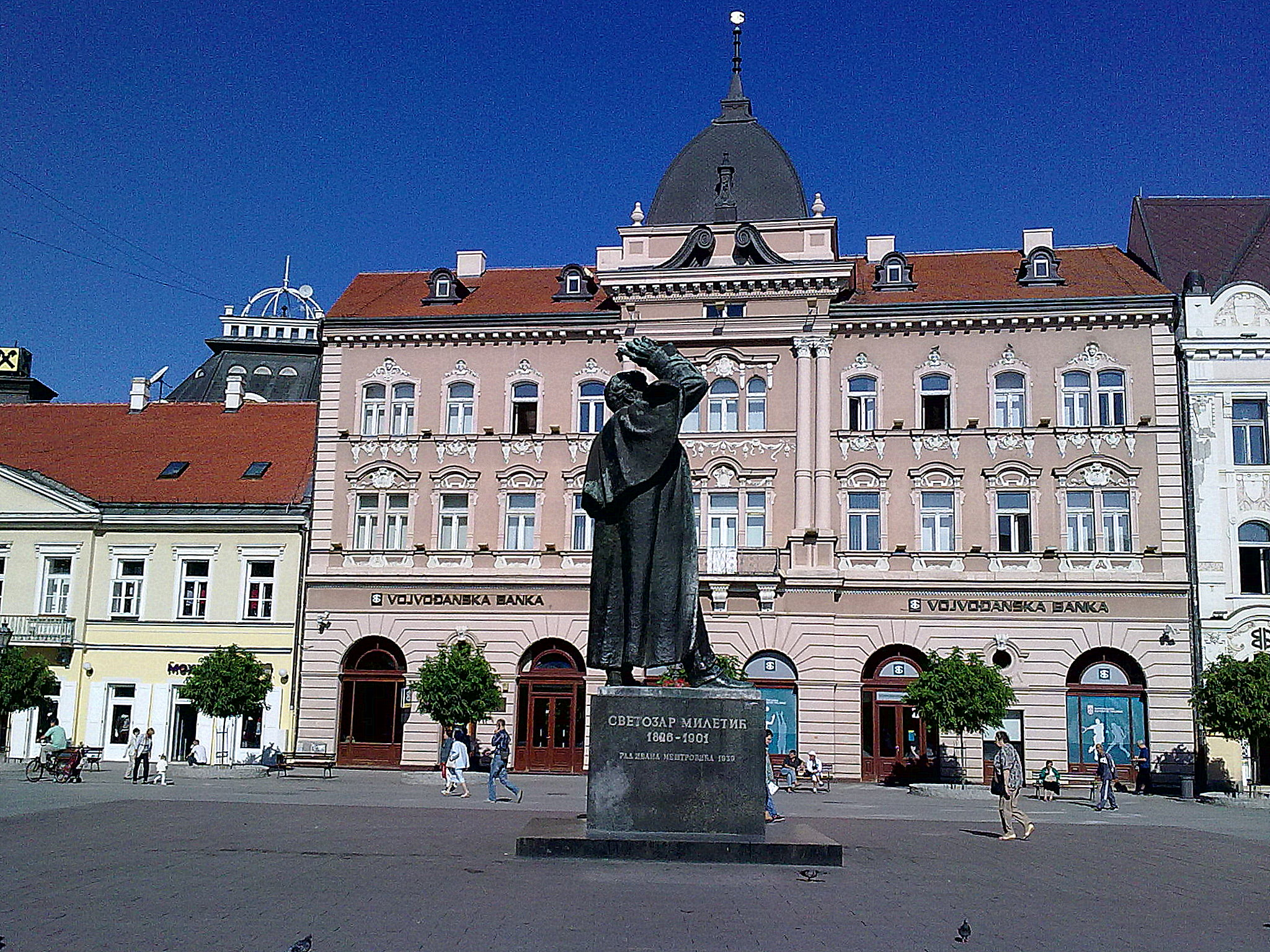 Nekadašnji Dom JNA na Trgu Slobode poznata po tome što je ravno pre 94 godina (25.11.1918.) u ovoj zgradi održana Velika Narodna Skupština Srba, Bunjevaca i ostalih Slovena na kojoj je doneta odluka o prisjedinjavanju Banata, Bačke i Baranje Kraljevini Srbije.